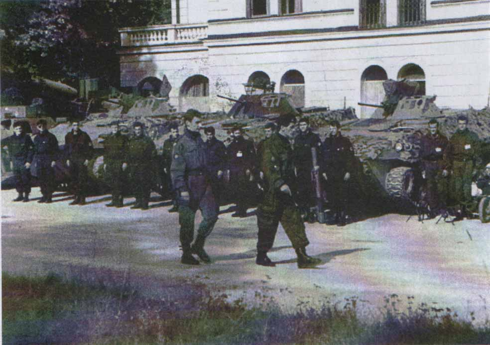 Српска гарда Илиџа